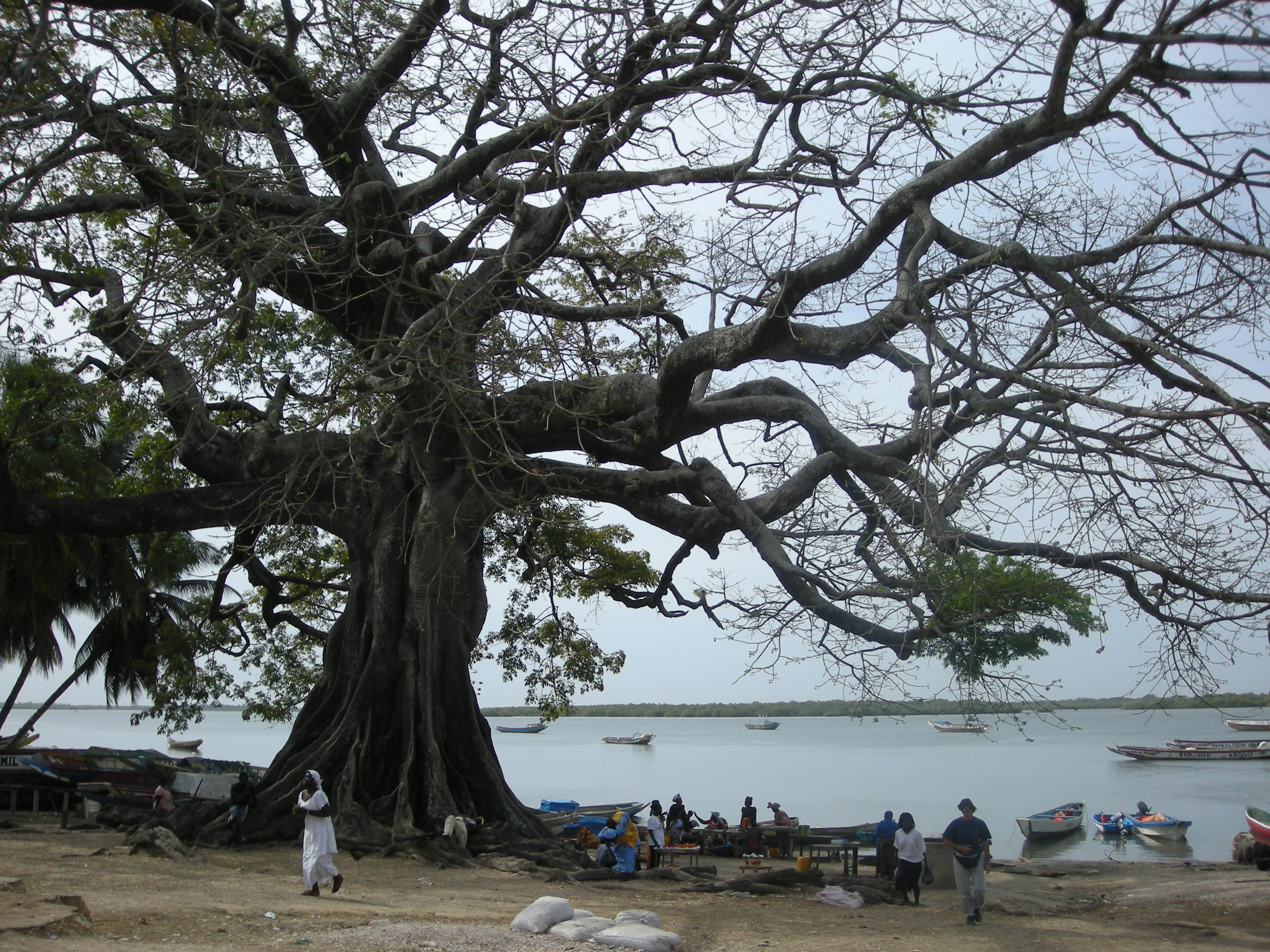 Le fromager près de l'embarcadère à Elinkine (Casamance, Sénégal)